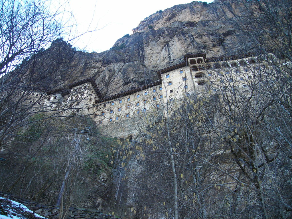 Evren BOSTAN tarafından çekilmiştir.